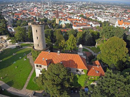 Bild der Sparrenburg mit einem Flugroboter angefertigt